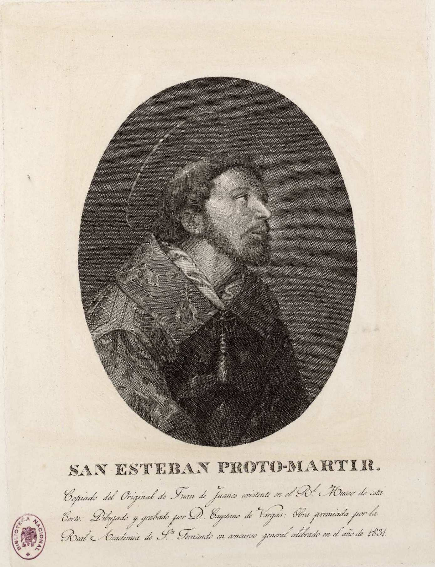 San Esteban protomártir. grabado calcográfico de reproducción. Inscripción: "San Esteban Proto-Mártir. Copiado del Original de Juan de Juanes existente en el Rl Museo de esta Corte. Dibujado y grabado por D. Cayetano de Vargas. Obra premiada por la Real Academia de Sn Fernando en concurso general celebrado en el año de 1831